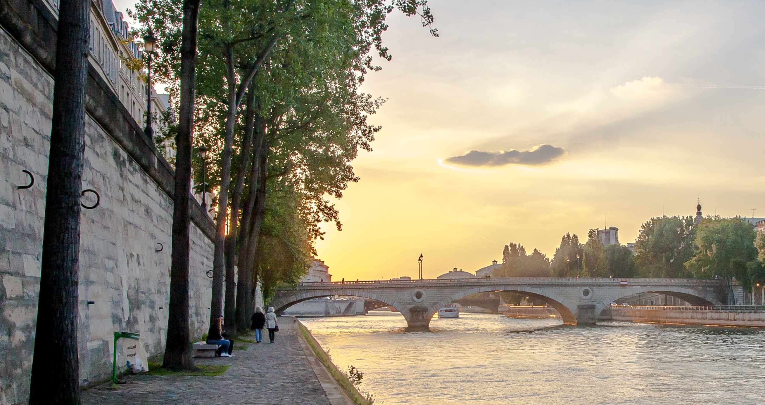 Pont Louis-Philippe, Paris, France.